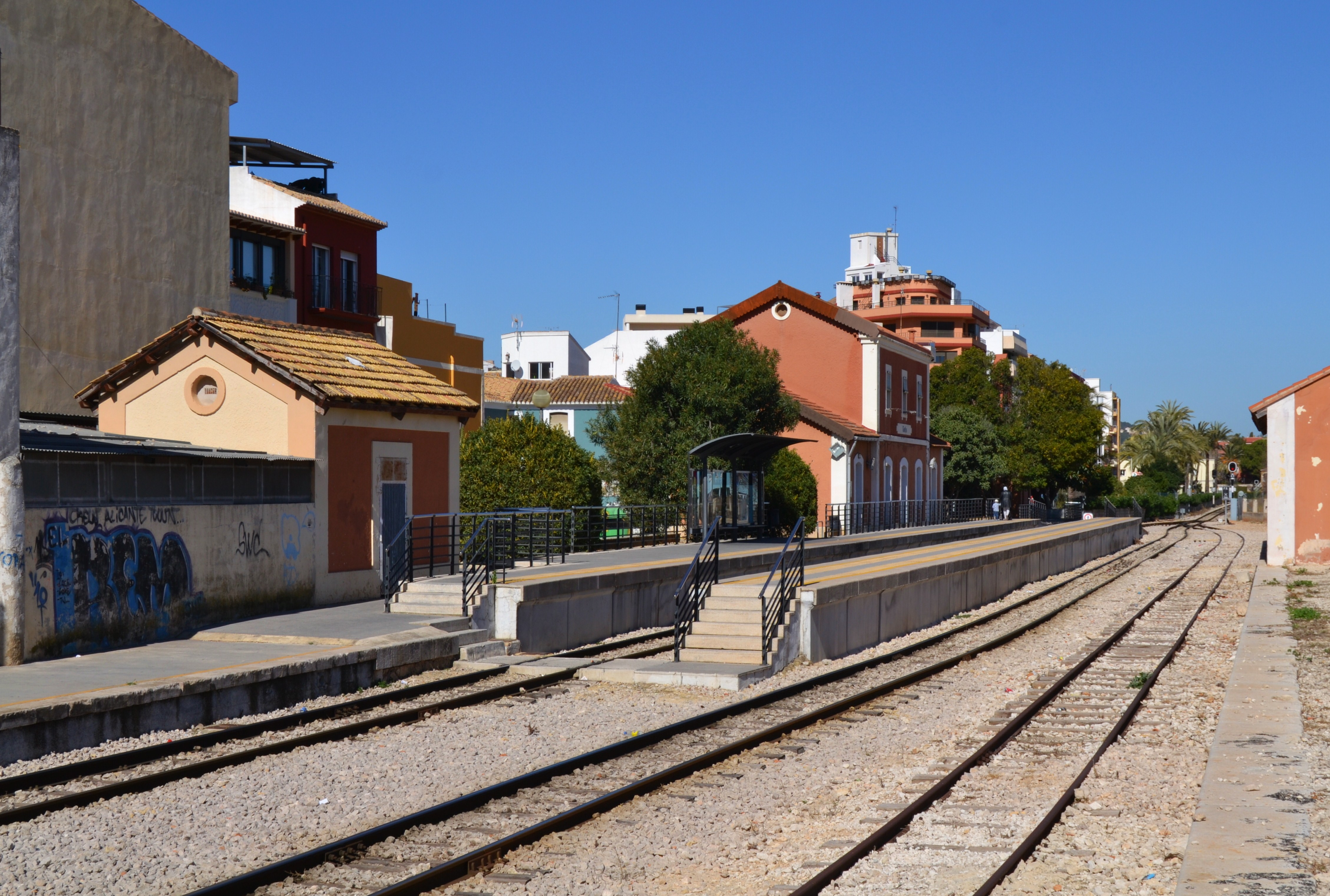 Vista de l'estació de Gata de Gorgos.